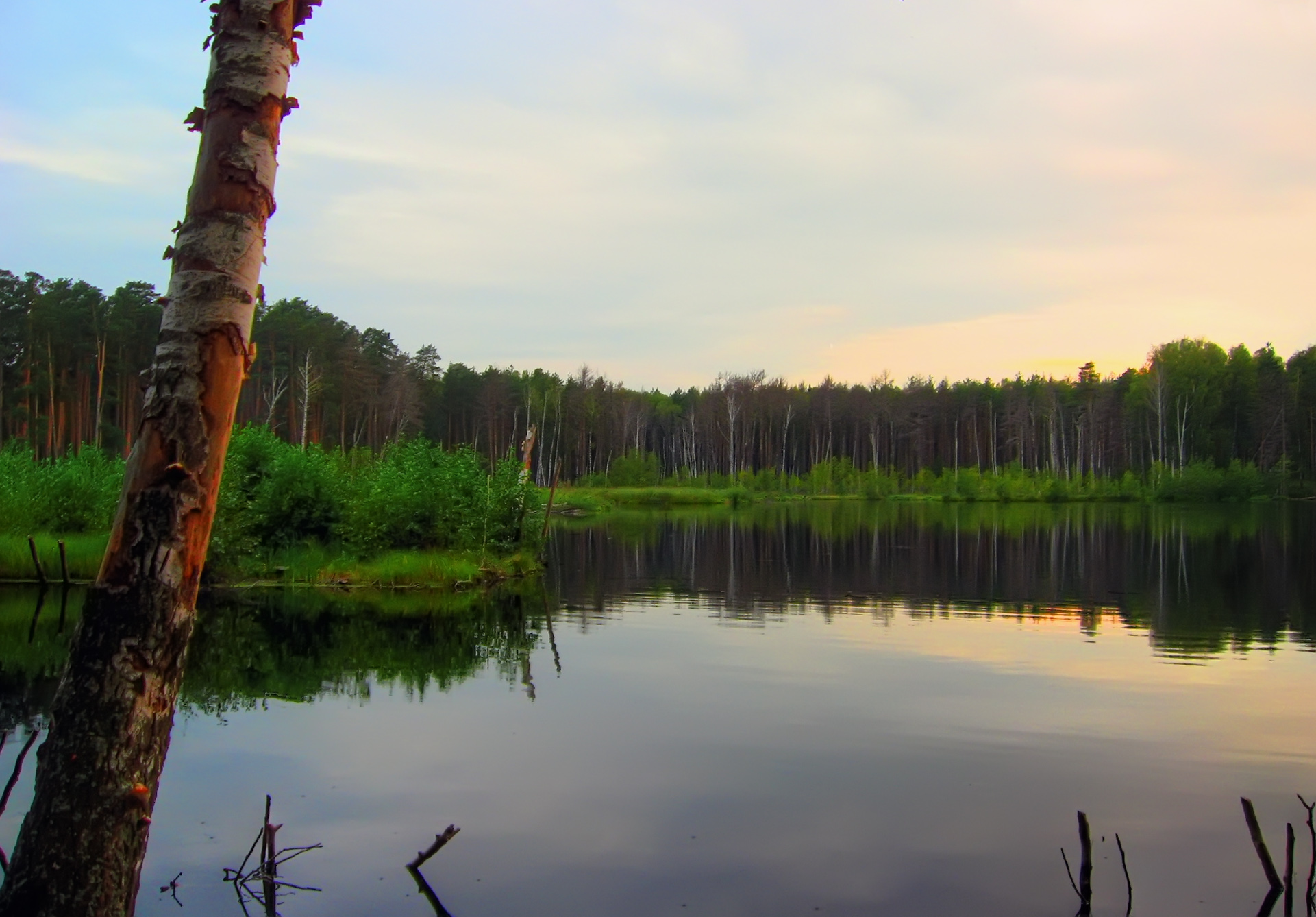 Озеро Святое Тумботинское This image is related to the protected area of Russia number 5210426